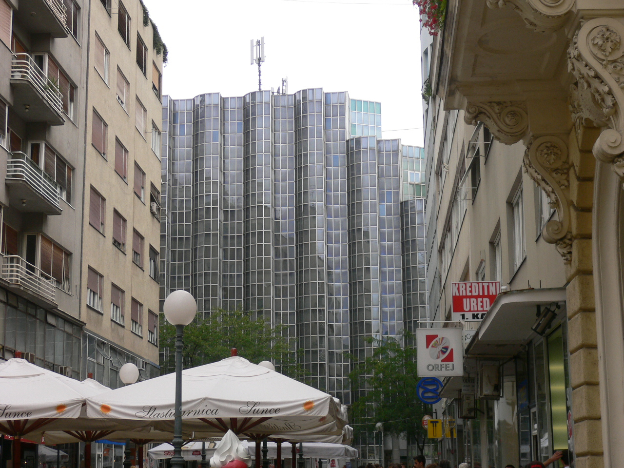 Bogovićeva et l'Hotel Dubrovnick - Centre de Zagreb